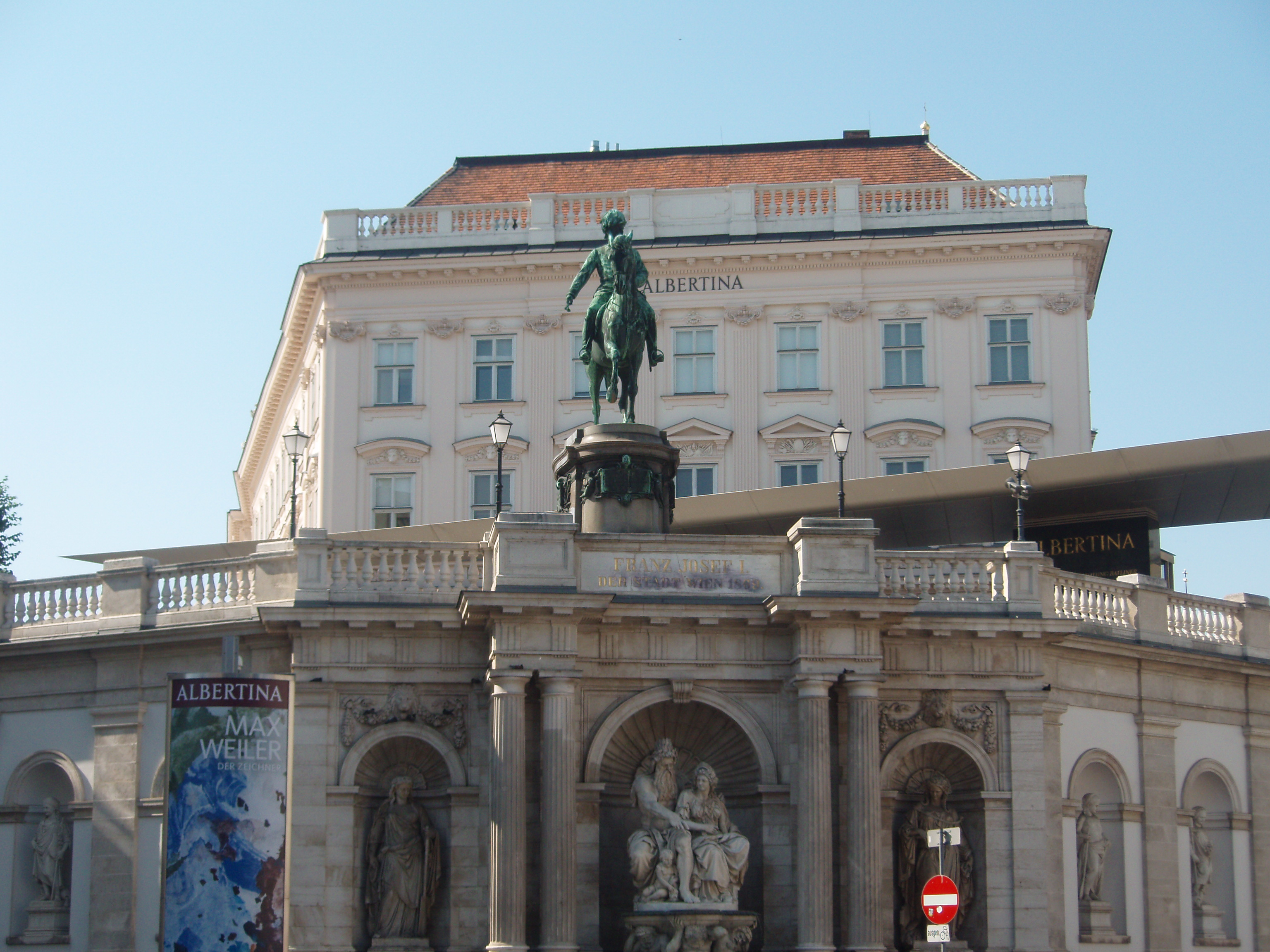 Albertina